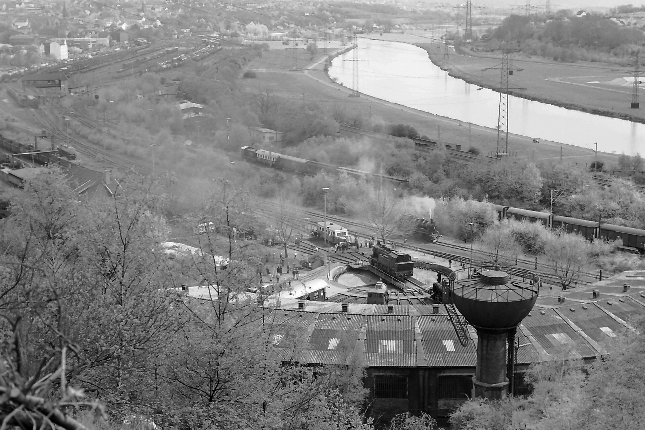 Güterbahnhof Bochum-Dahlhausen mit Bahnbetriebswerk, heute Eisenbahnmuseum; Wasserturm im Vordergrund, Ruhr im Hintergrund (auf der anderen Seite Essen-Burgaltendorf)